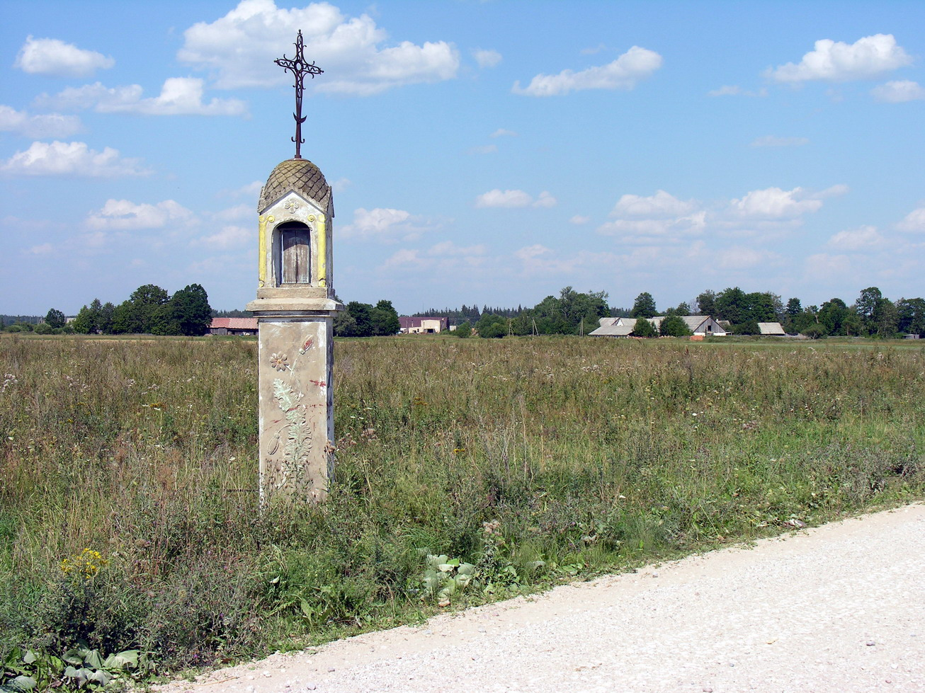 Purvėnai, Mažeikų raj., Mažeikių apylinkės seniūnija. Koplytstulpis (past. 1940 m.) prie vieškelio Mažeikiai-Laižuva Foto: Algirdas, 2006 m. rugpjūčio 11 d., Lietuva